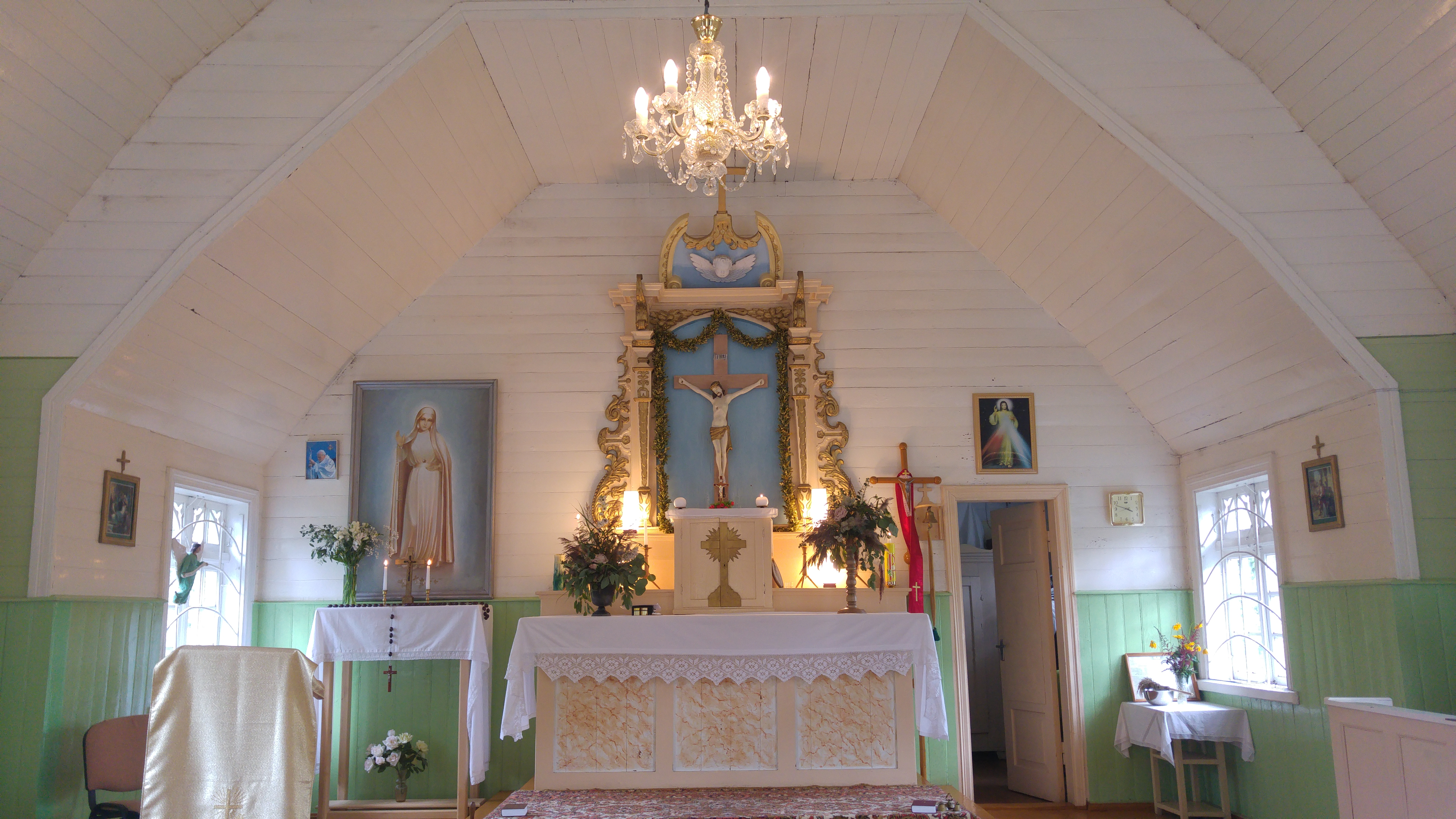 Altāris, Dāviņu pagasts